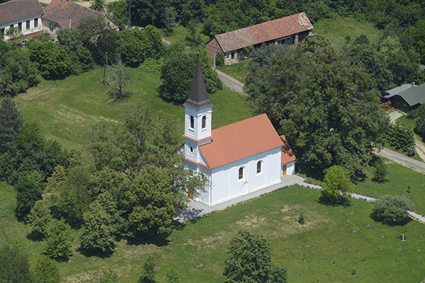 Kercaszomor református templom, légi felvétel